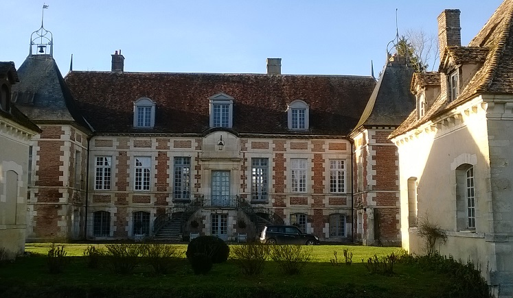 Château: le corps de logis en briques avec chaînages de pierre de taille blanche, avec son escalier central en fer à cheval, la cour d'honneur qui parait en herbe, les deux tours carrées de part et d'autre et au 1er plan le bord des douves non visibles